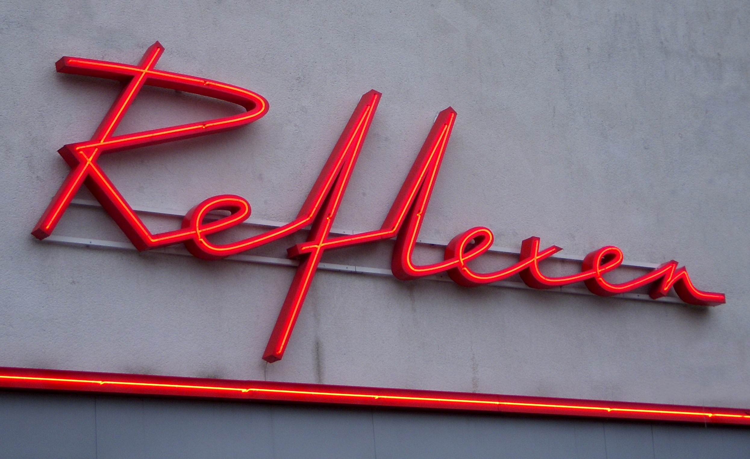 Neonskylt till "Reflexen" i Kärrtorp, Stockholm, renoverat av Focus Neon